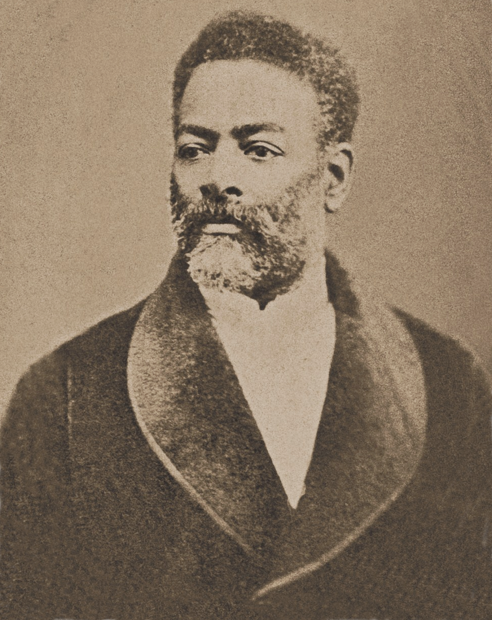 O líder abolicionista e ex-escravo brasileiro Luiz Gama, numa imagem por volta de 1880.